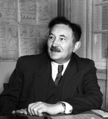 Anton Storch Bundesminister für Arbeit und Sozialordnung, 1949-1957